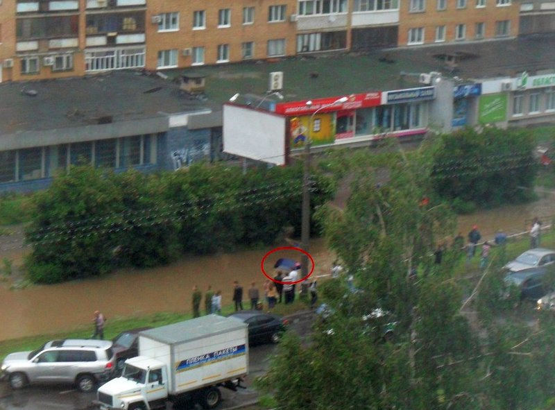 авария